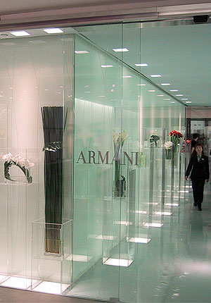 Negozio di Armani ad Hong Kong